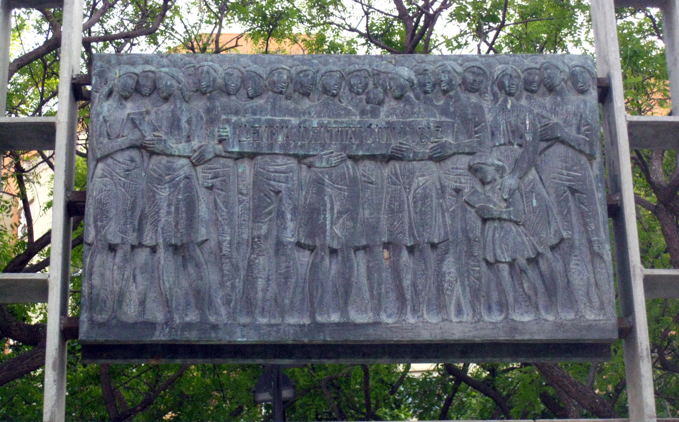 A Josep Maria Folch i Torres (Josep Ricart i Maymir). Pl. Josep Maria Folch i Torres (Barcelona)